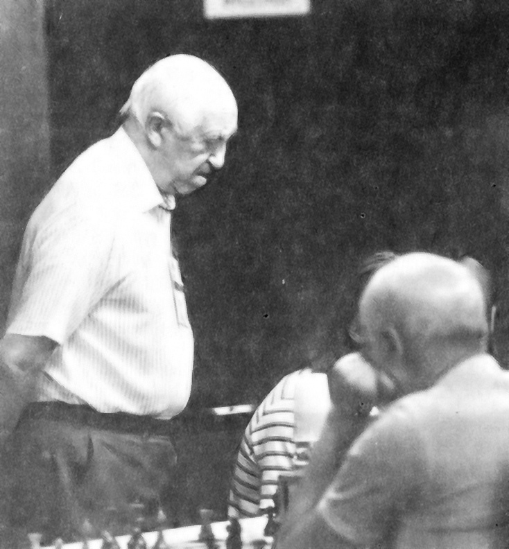 GM Migiel Najdorf (1910-1997), olimpiada szachowa w Manili (1992)